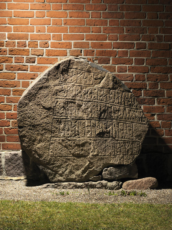 Tågerup-stenen. Foto: Nationalmuseet ved Roberto Fortuna